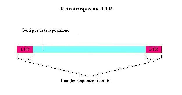 Retrotransposon